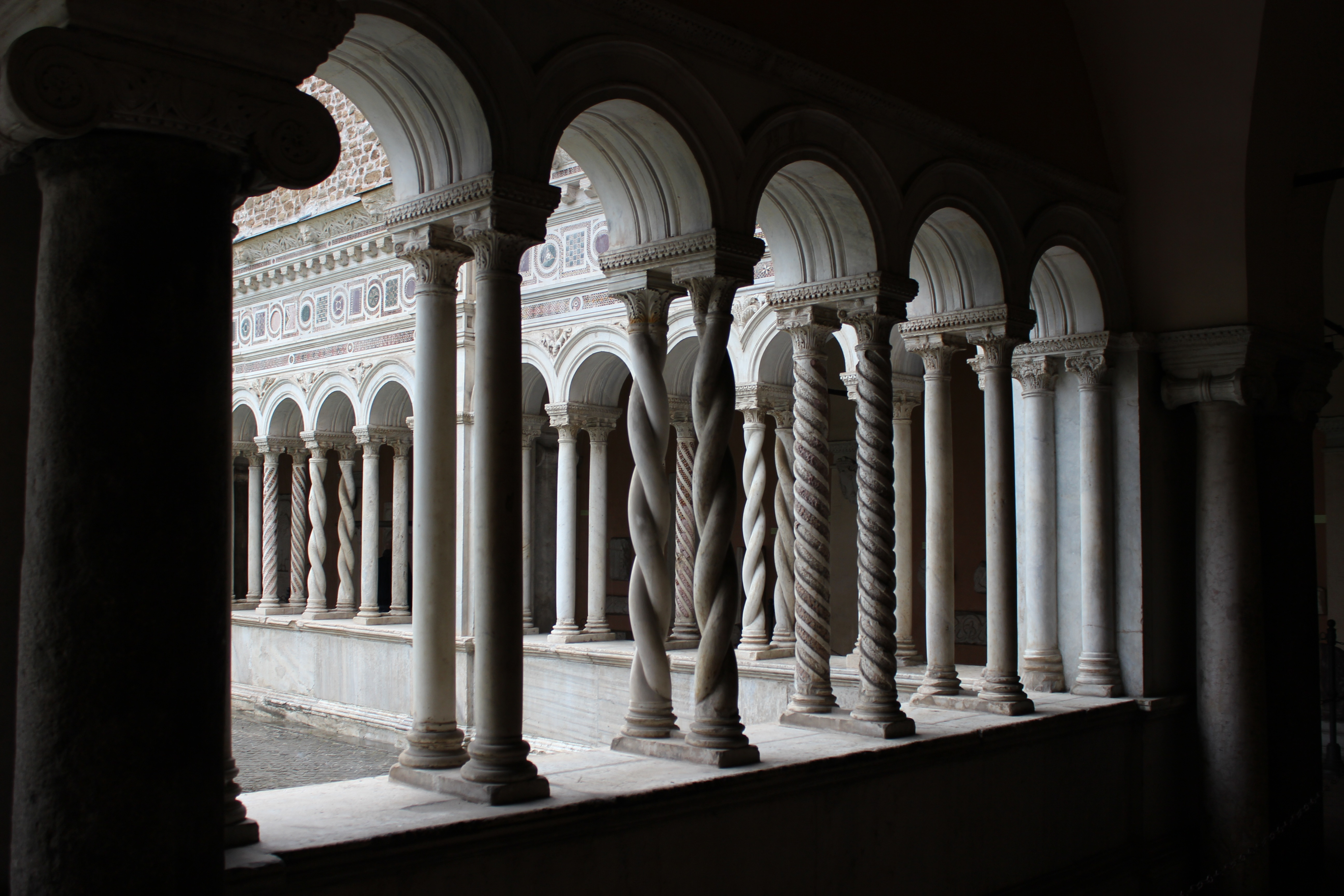 Roma. Claustro de San Giovanni in Laterano.